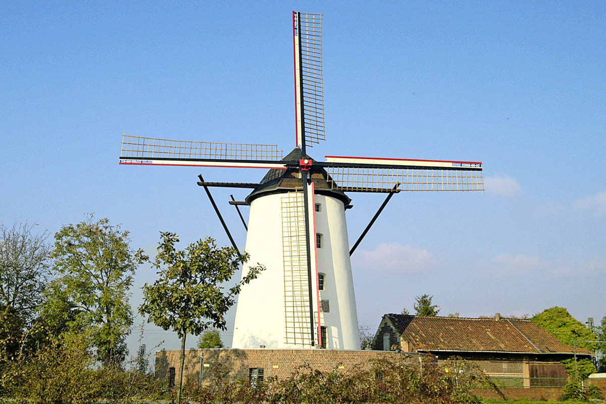 Die MühleBraun in Büttgen nach der Renovierung